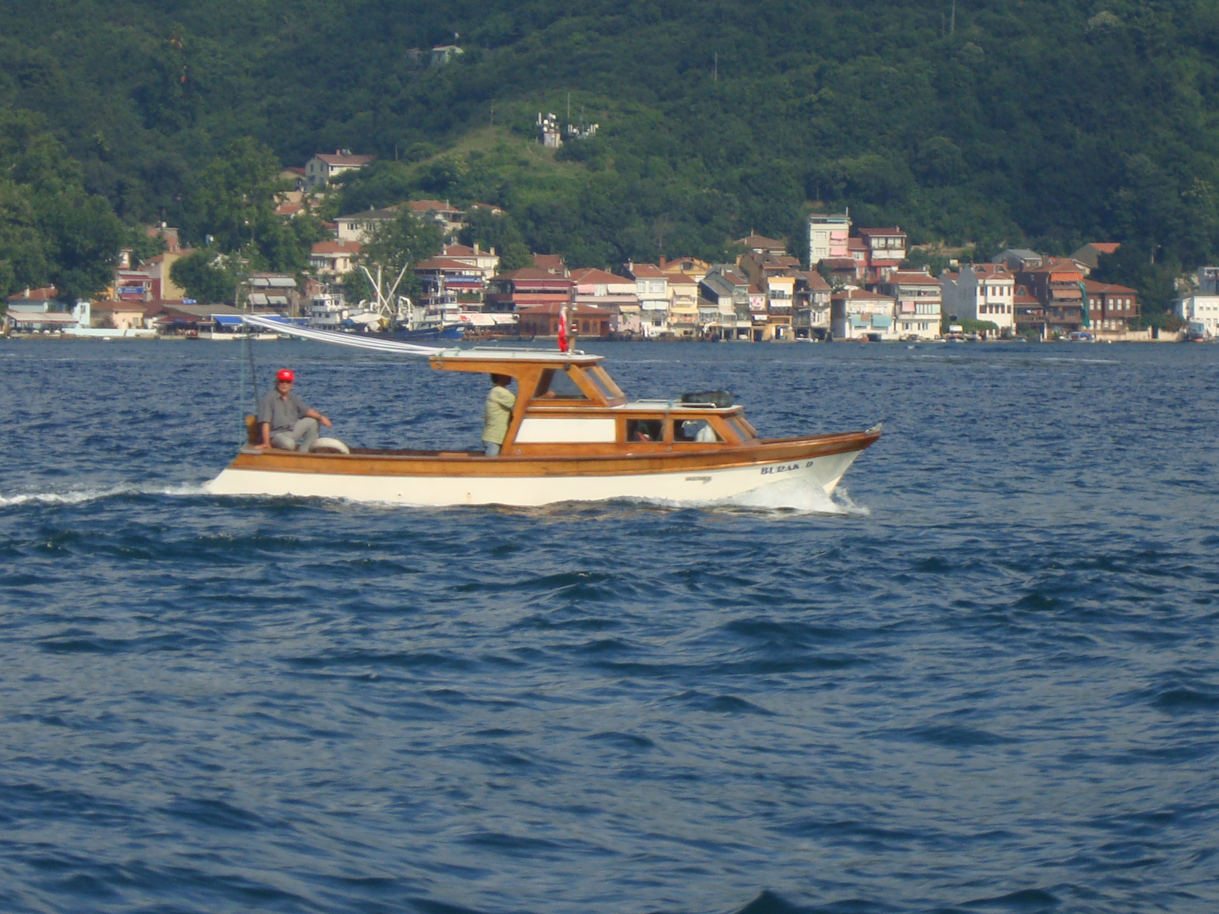 İncirköy, Saip Molla Cd. No:71, 34800 Beykoz/İstanbul, Turkey